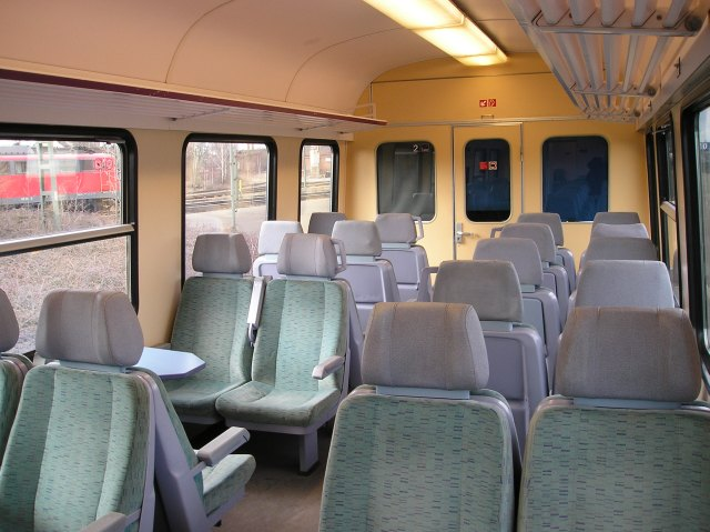 Inneneinrichtung des 614 002 im Bereich der zweiten Klasse